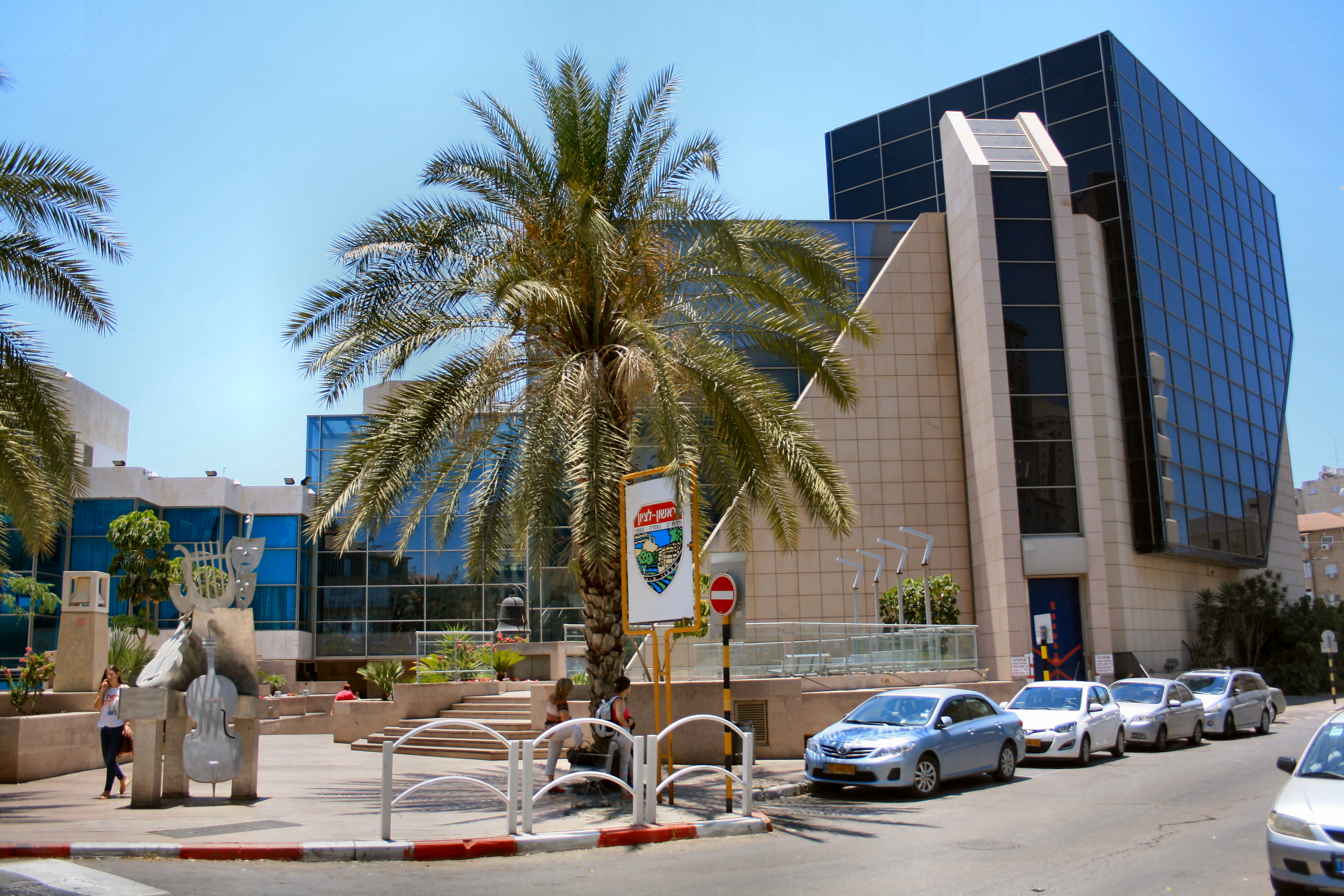 היכל התרבות ראשון לציון